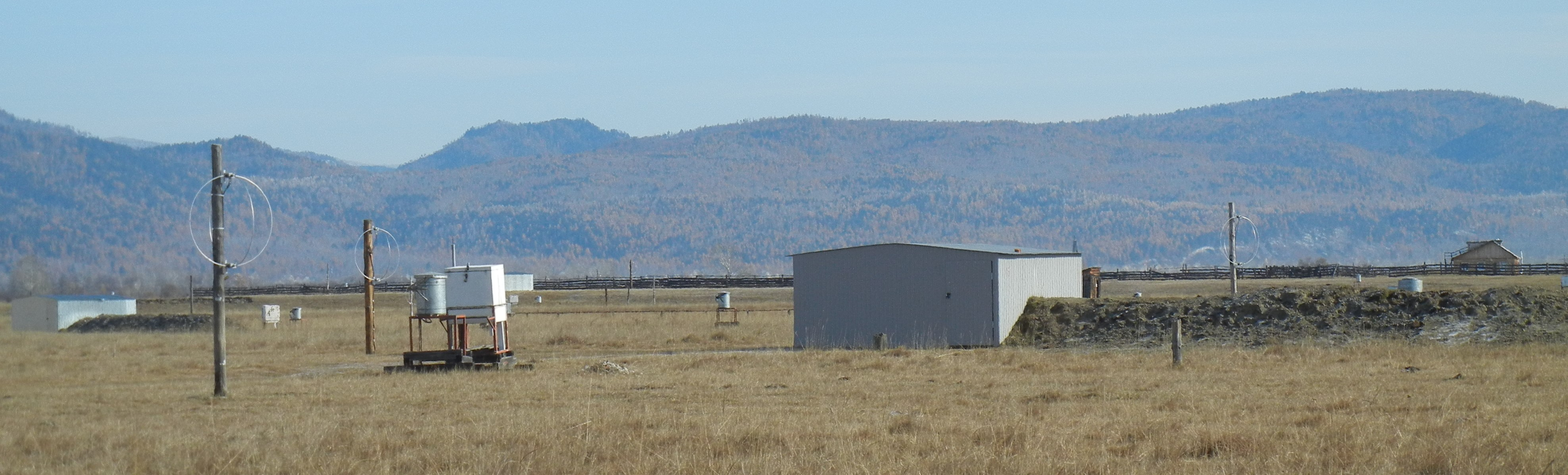 Foto verschiedener Detektoren für kosmische Strahlung des Tunka-Experiments (TAIGA)